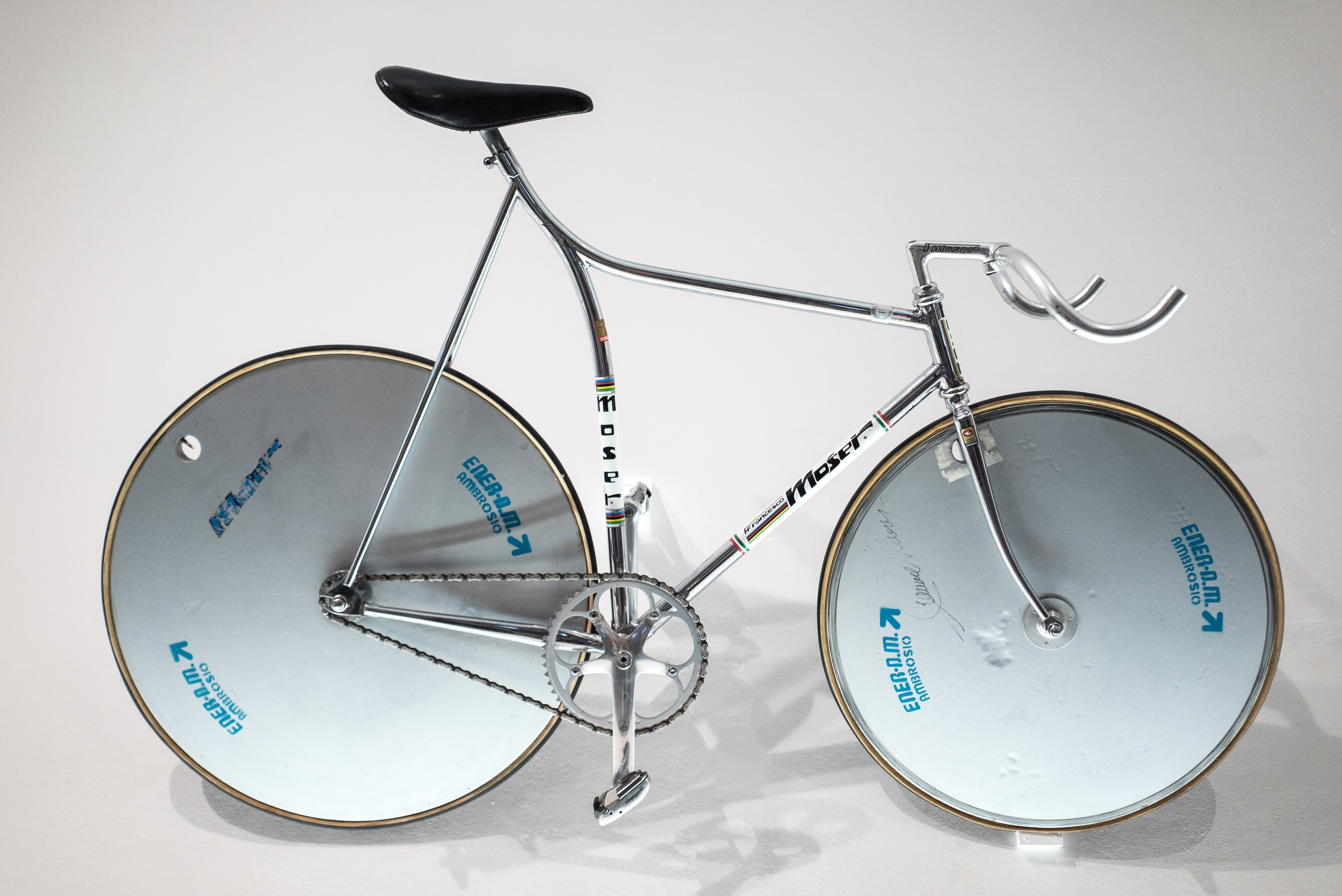 Design Museum